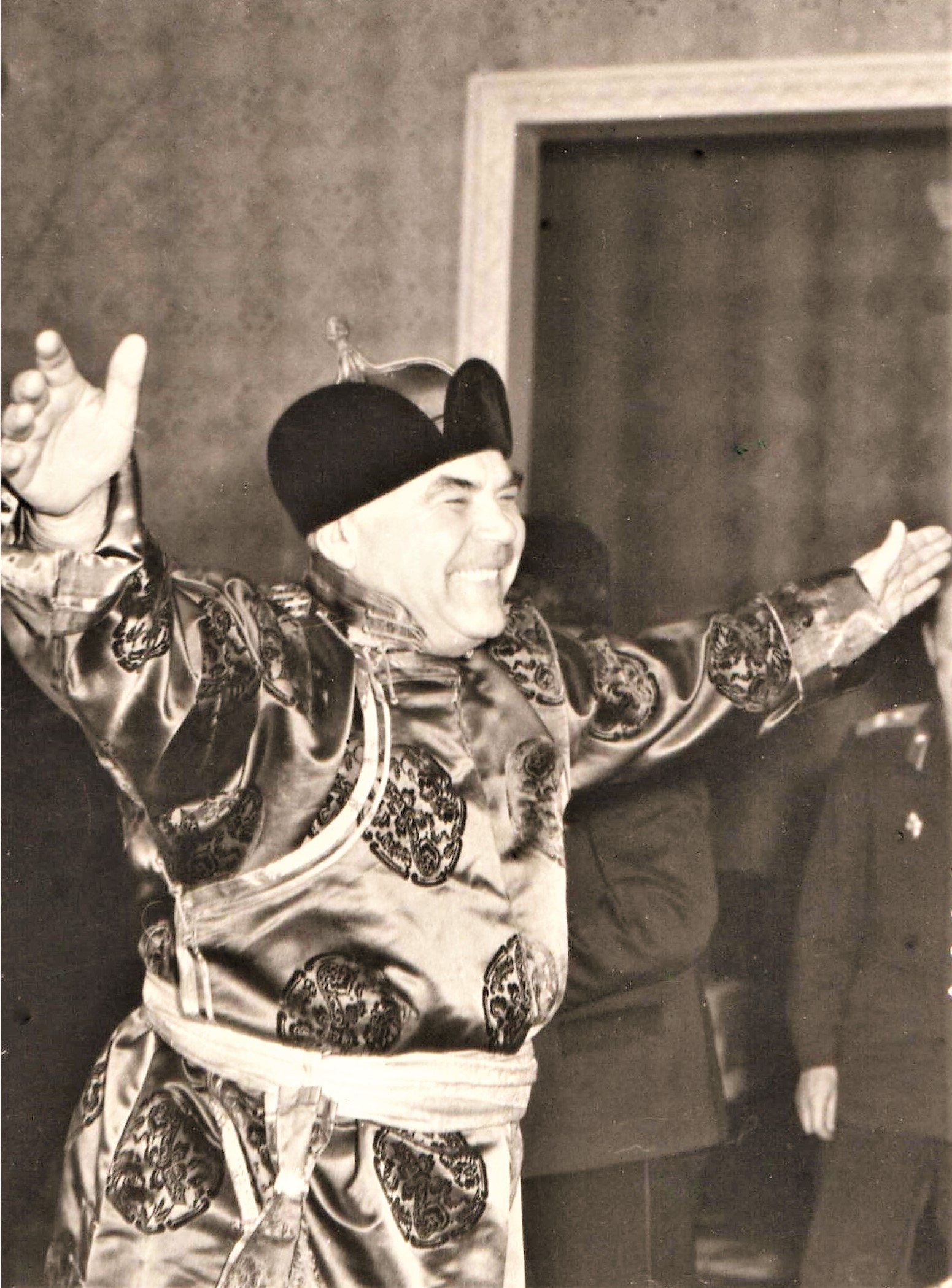 В 1961 году Министр обороны СССР Р. Я. Малиновский совершил официальный визит в Монгольскую Народную Республику. Помимо протокольных мероприятий Родион Яковлевич участвовал в ряде неофициальных встреч. На фотографии Р. Я. Малиновский в национальном монгольском костюме на встрече с боевыми соратниками из монгольской народно-революционной армии, вместе с которыми он громил Квантунскую армию в 1945 году.